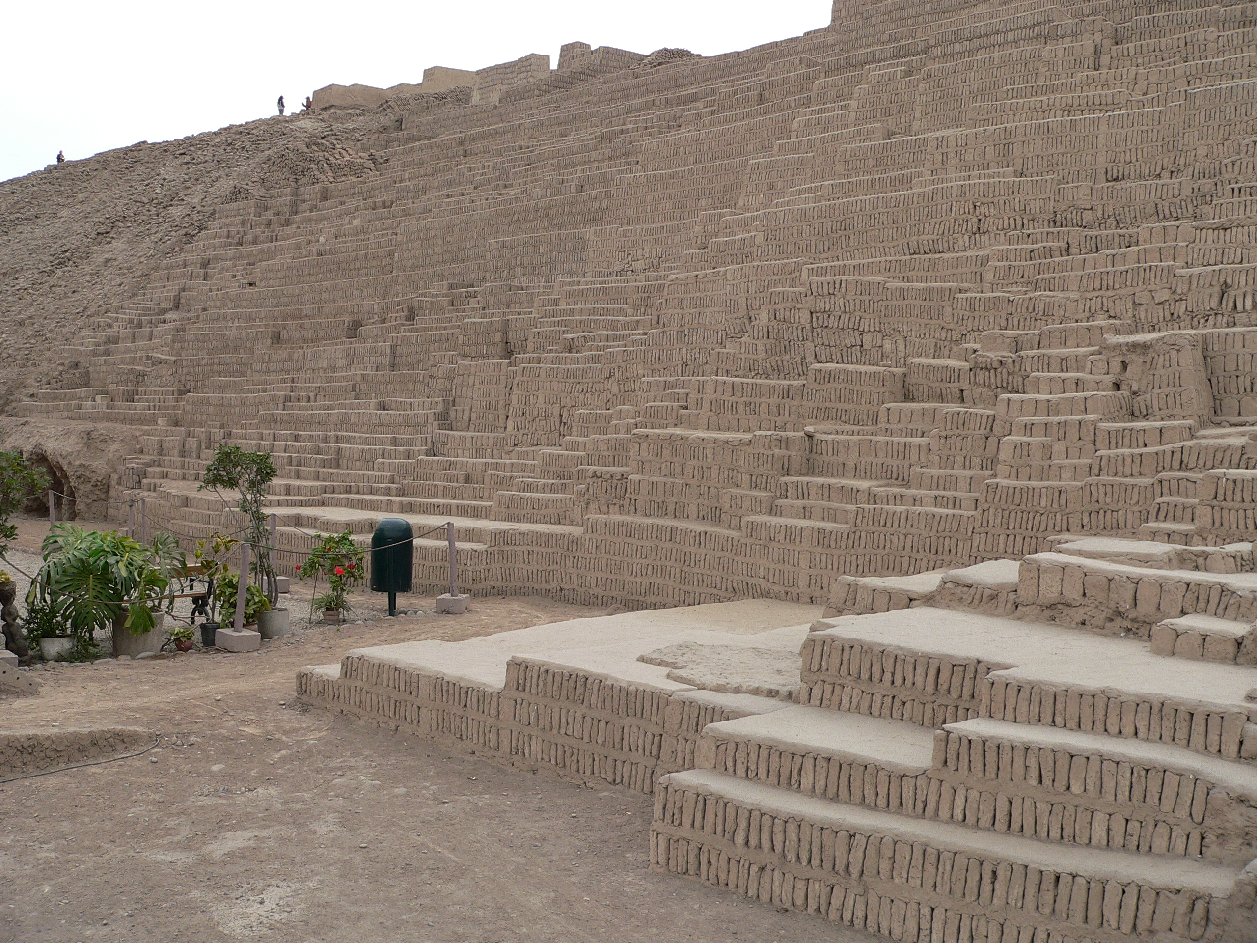 Huaca Pucllana, Miraflores, Lima. Foto tomada por © Manuel González Olaechea y Franco